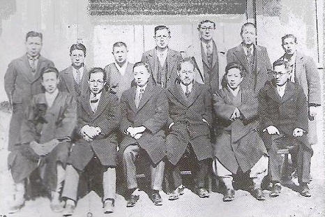 의열단사진